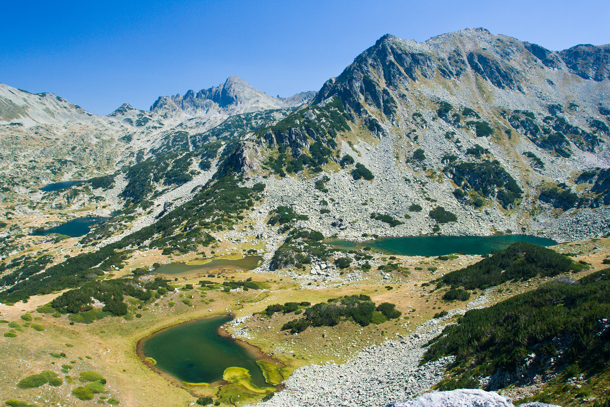 Пирин, Пирин, Превалските езера